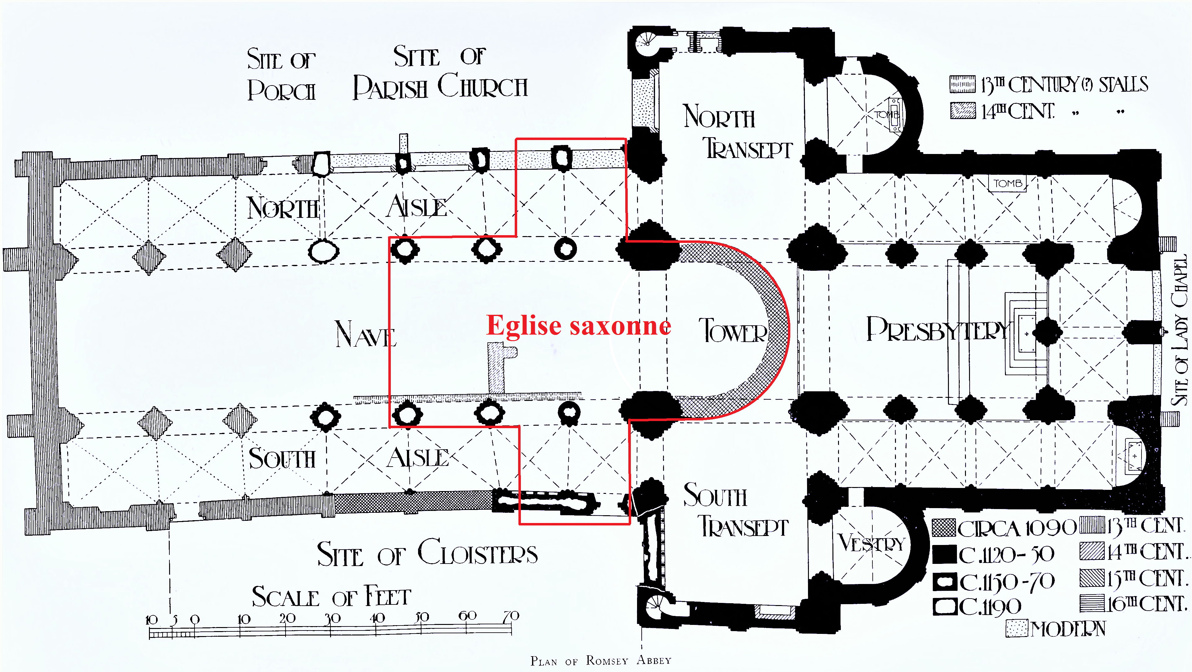 Abbaye de Romsey, plan des phases de construction (fond de plan Commons de 1900 modifié)